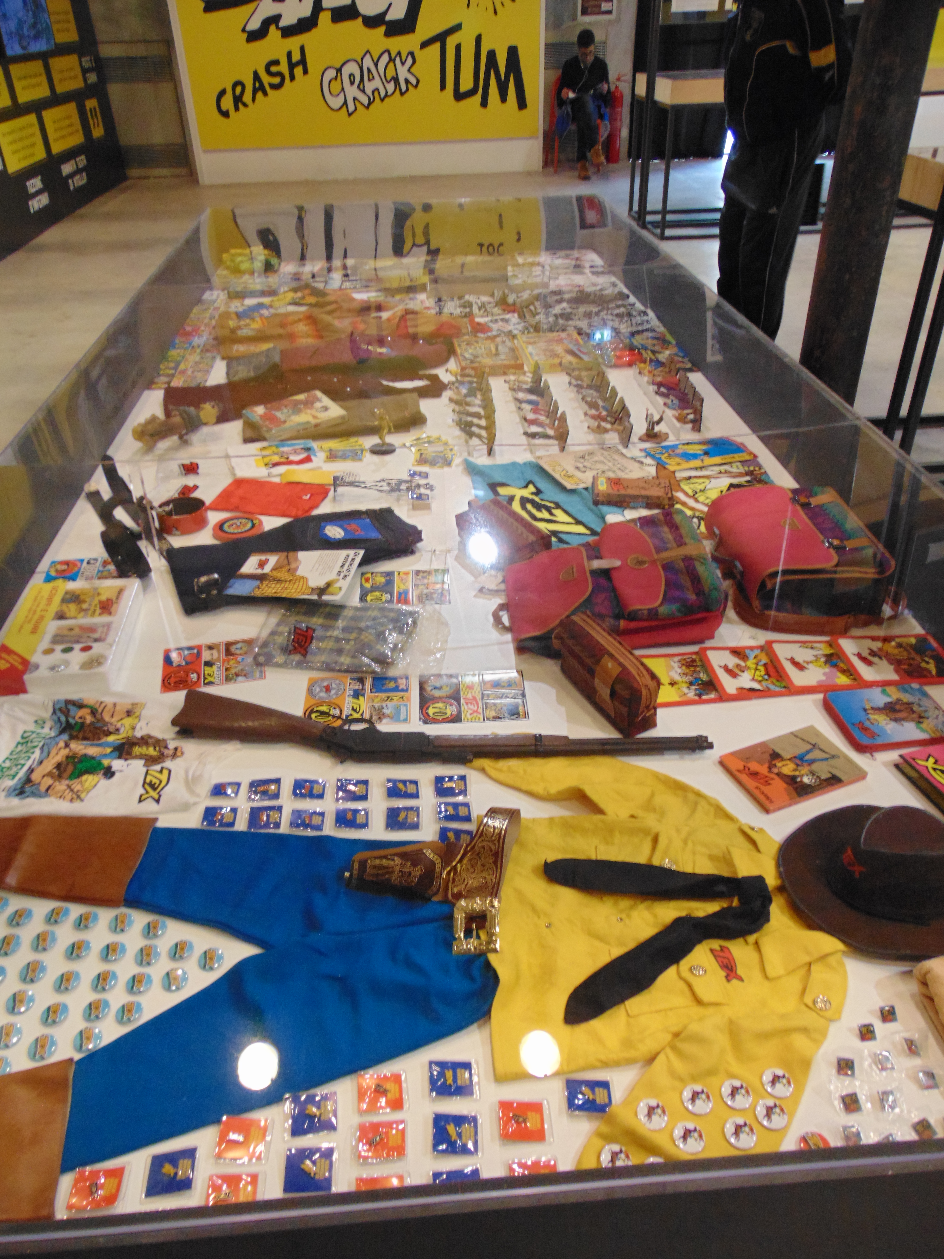 Tex - 70 anni di un mito @ Arf! Festival 2019